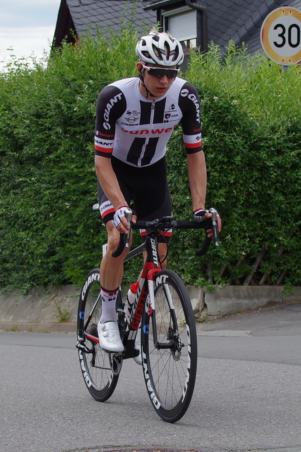 Deutsche Meisterschaften im Straßenrennen 2017 (Männer) 25. Juni 2017 Runde 7 Bergwertung Reichenhain The making of this document was supported by the Community-Budget of Wikimedia Germany.